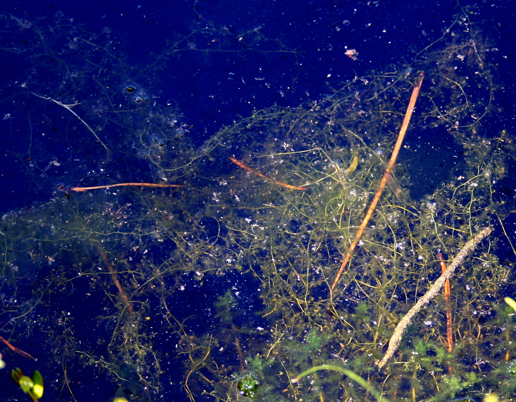 Park Narodowy Bory Tucholskie, zbiorowisko pływacza drobnego